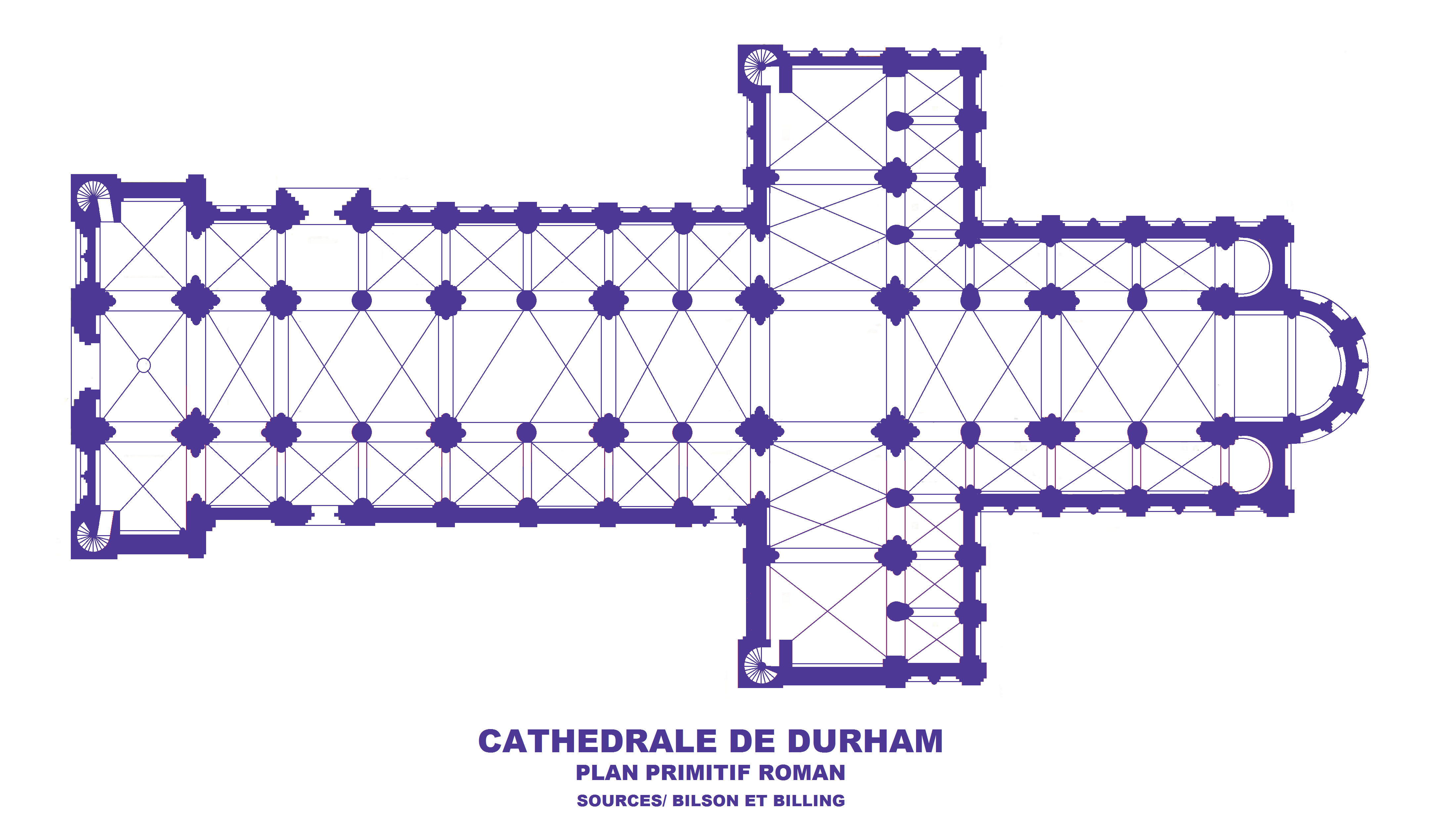 Cathédrale de Durham, plan roman